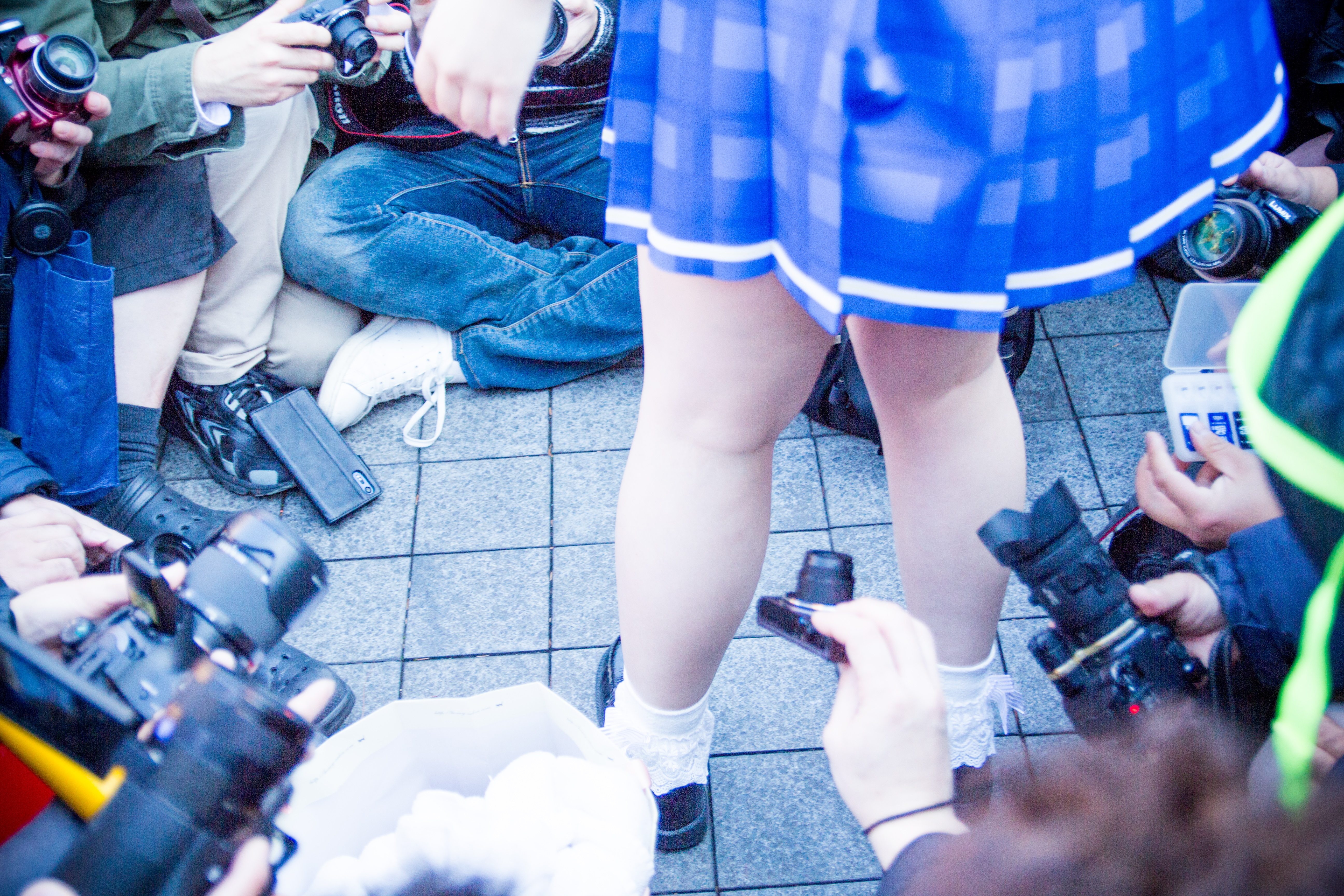 コミックマーケット91のコスプレ広場にて、ローアングラー撮影を試みるカメラマン。これは、コスプレイベントによっては禁止されている行為である。